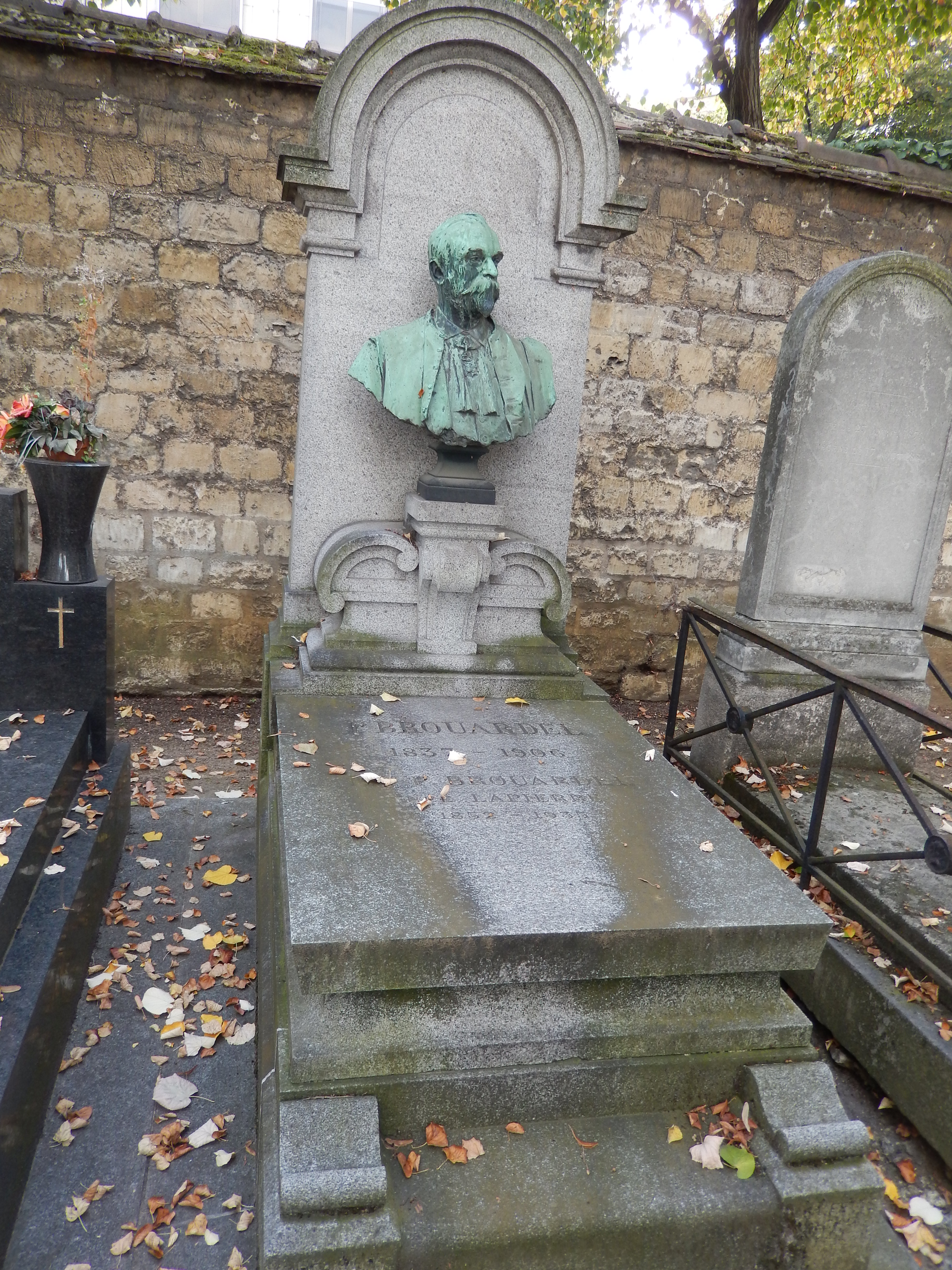 Tombe de Paul Brouardel (cimetière du Montparnasse)